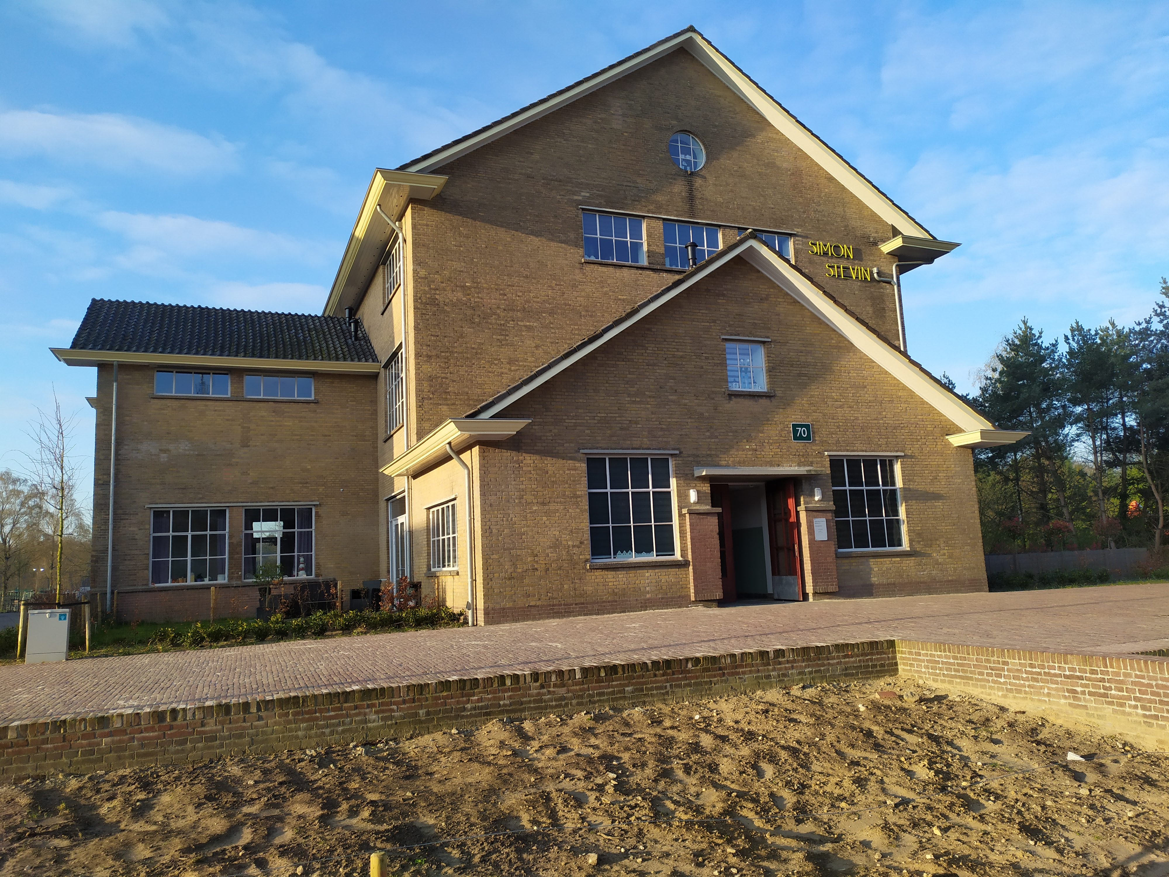 voormalige Simon Stevinkazerne Ede 2 april 2020